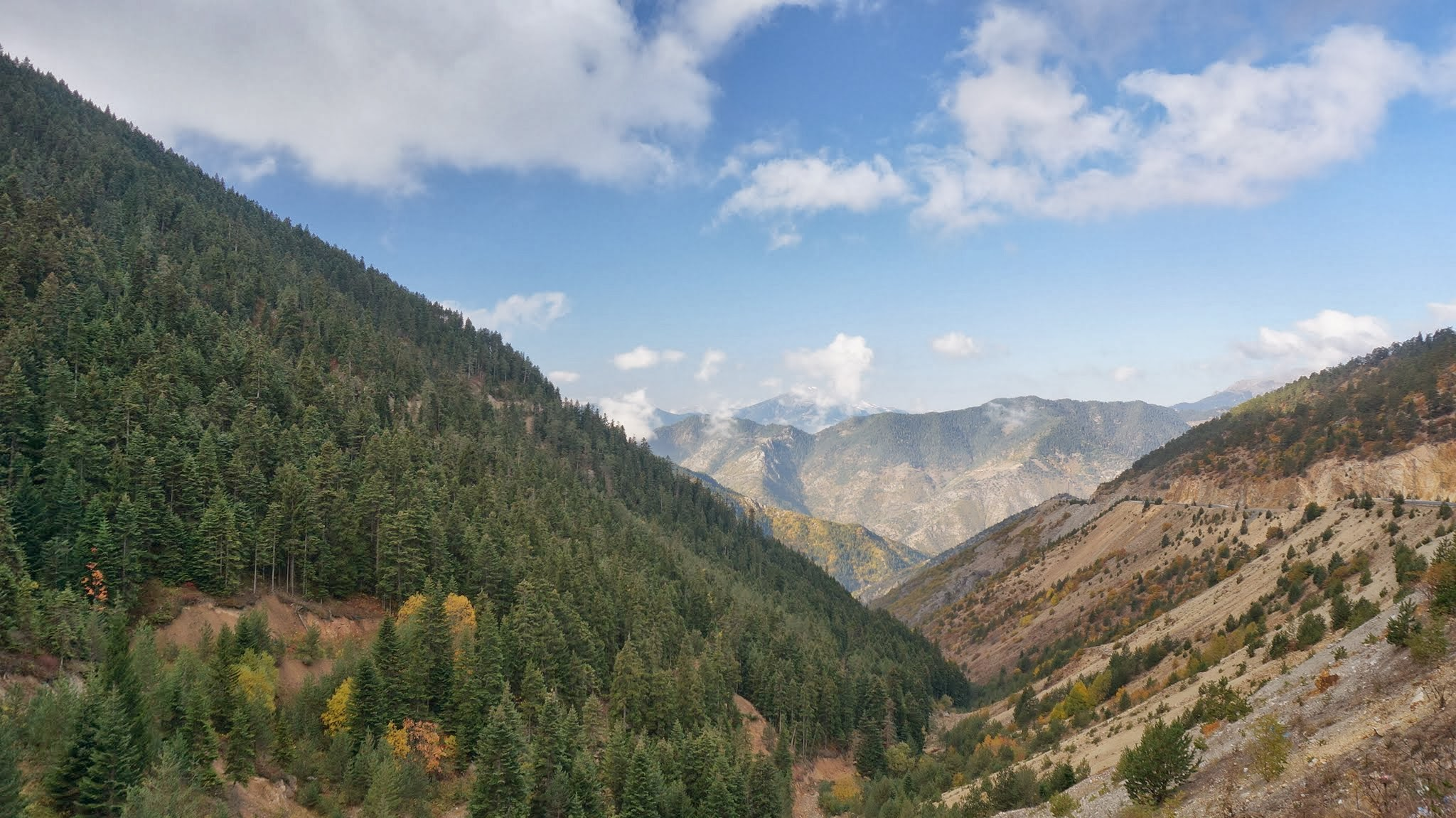 29800 Zigana/Torul/Gümüşhane, Turkey